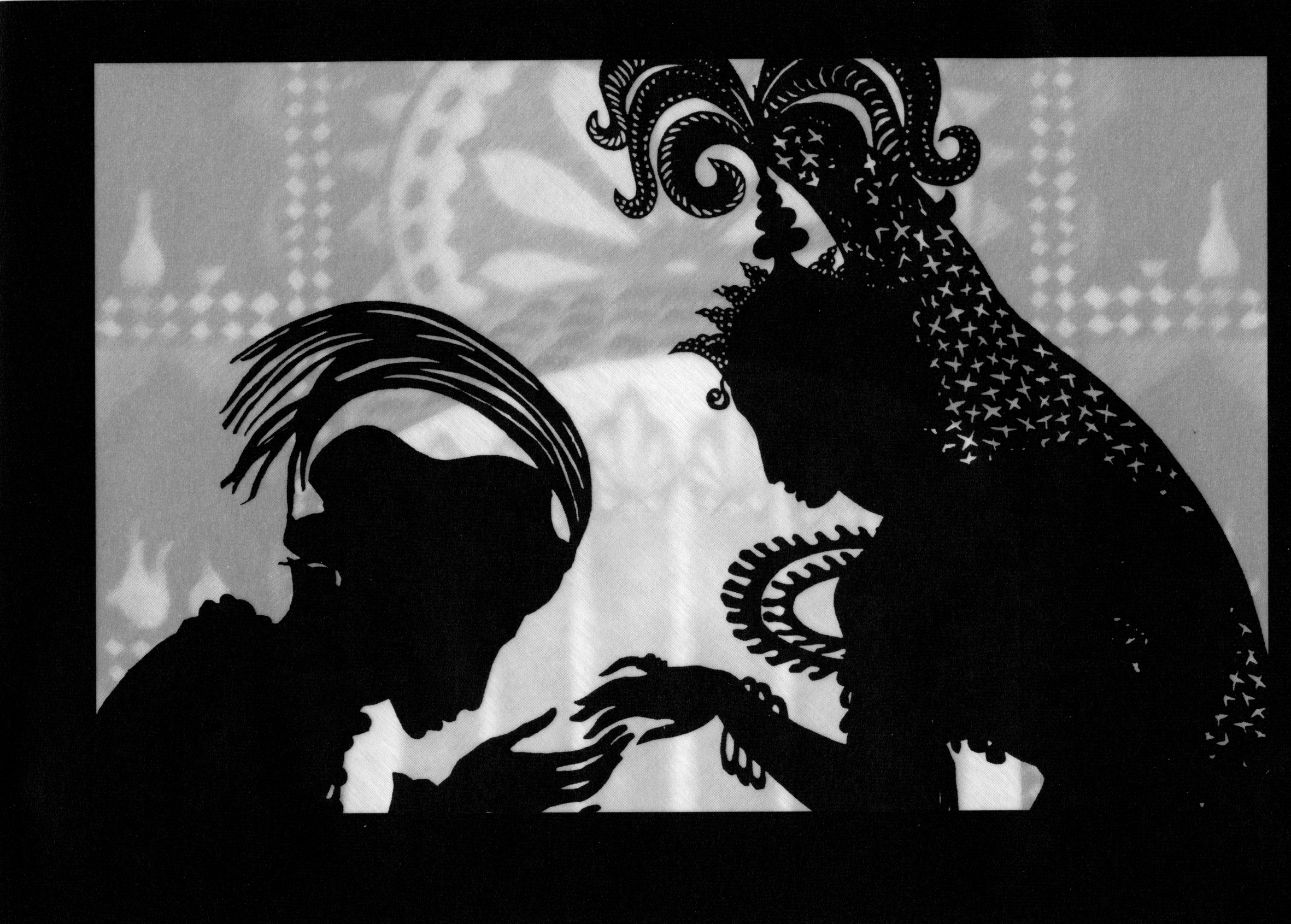 fra silhuettfilmen Die Abenteuer des Prinzen Achmed (1923–1926) Filmskaper: Lotte Reiniger